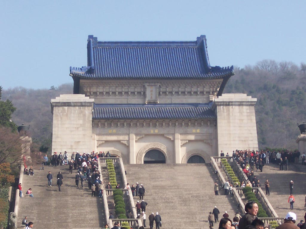 中山陵祭堂 Bân-lâm-gú: Tiong-san-lîng tsè-tn̂g